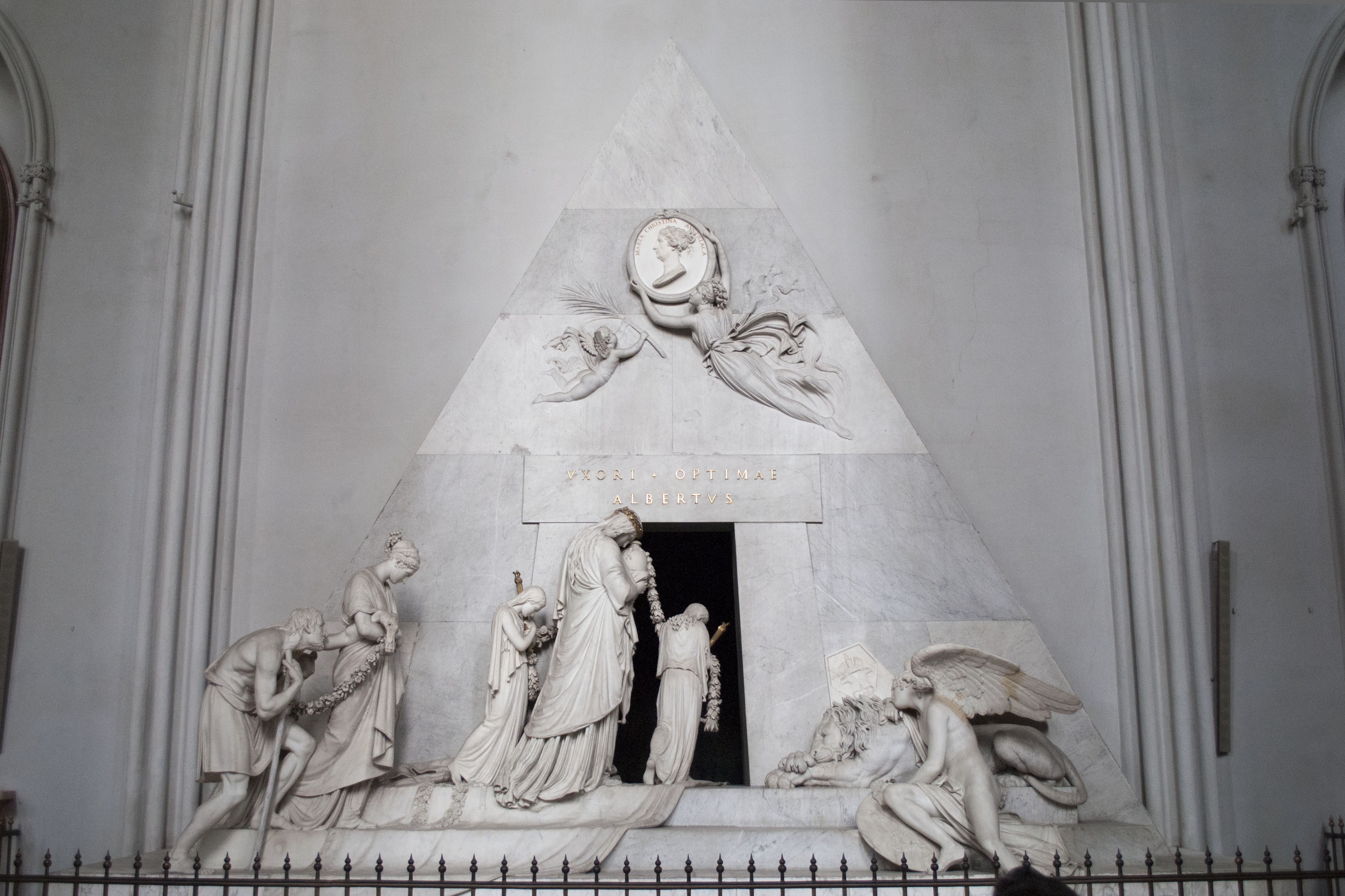 Augustinerkirche, ehem. Hofpfarrkirche hl. Augustin